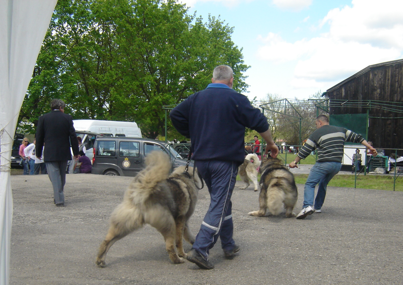 Ciobănesc caucazian